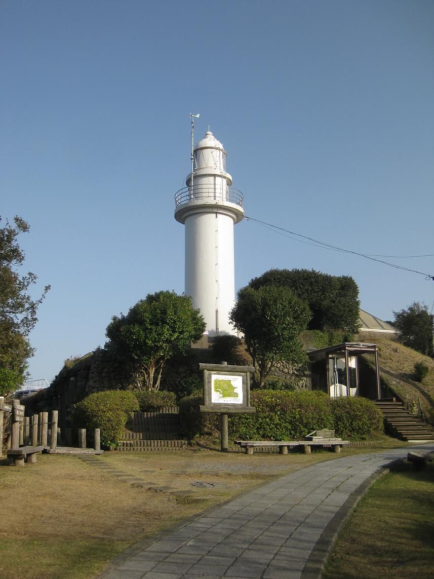 九州最東端にある鶴御崎灯台の画像である。